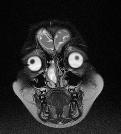 Nasal glioma, MRI T2